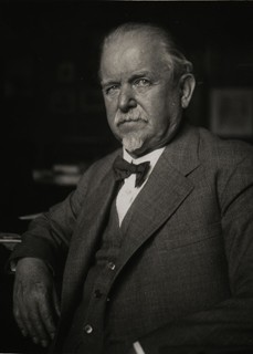 Cyril Purkyně (1862-1937), český geolog, přírodovědec a vysokoškolský profesor